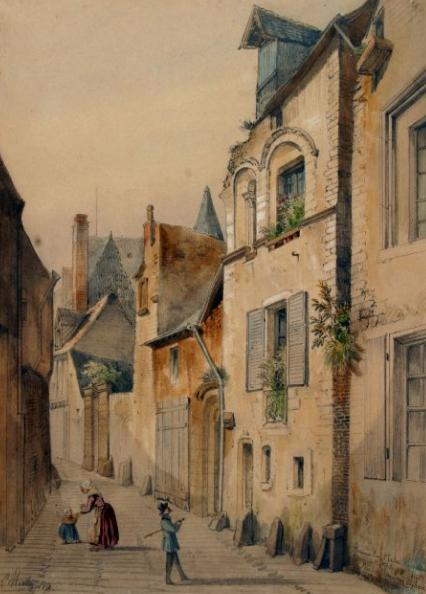 Une aquarelle de Louis Moullin représentant la première église de Saint-Aldric fondée au Mans au IXè siècle. Peinture et dessin du XIXè siècle.